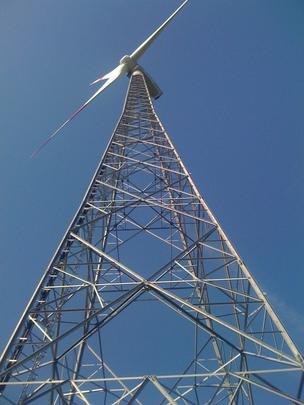 Windkraftanlage Repower MD77, Bau-Nr.: 70680, in Kölkebeck